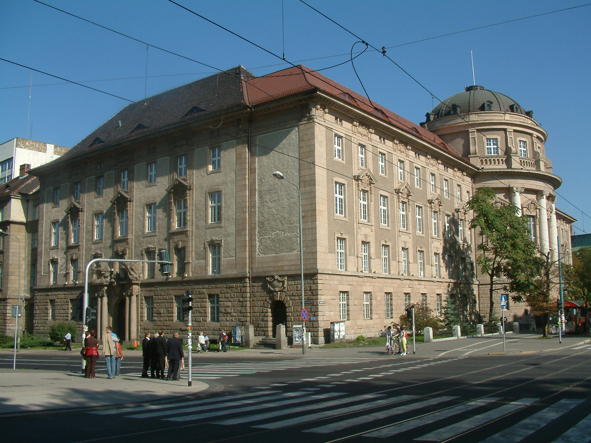 Ehemaliges Gebäude der Preußischen Ansiedlungskommission, heute Collegium Maius in Posen